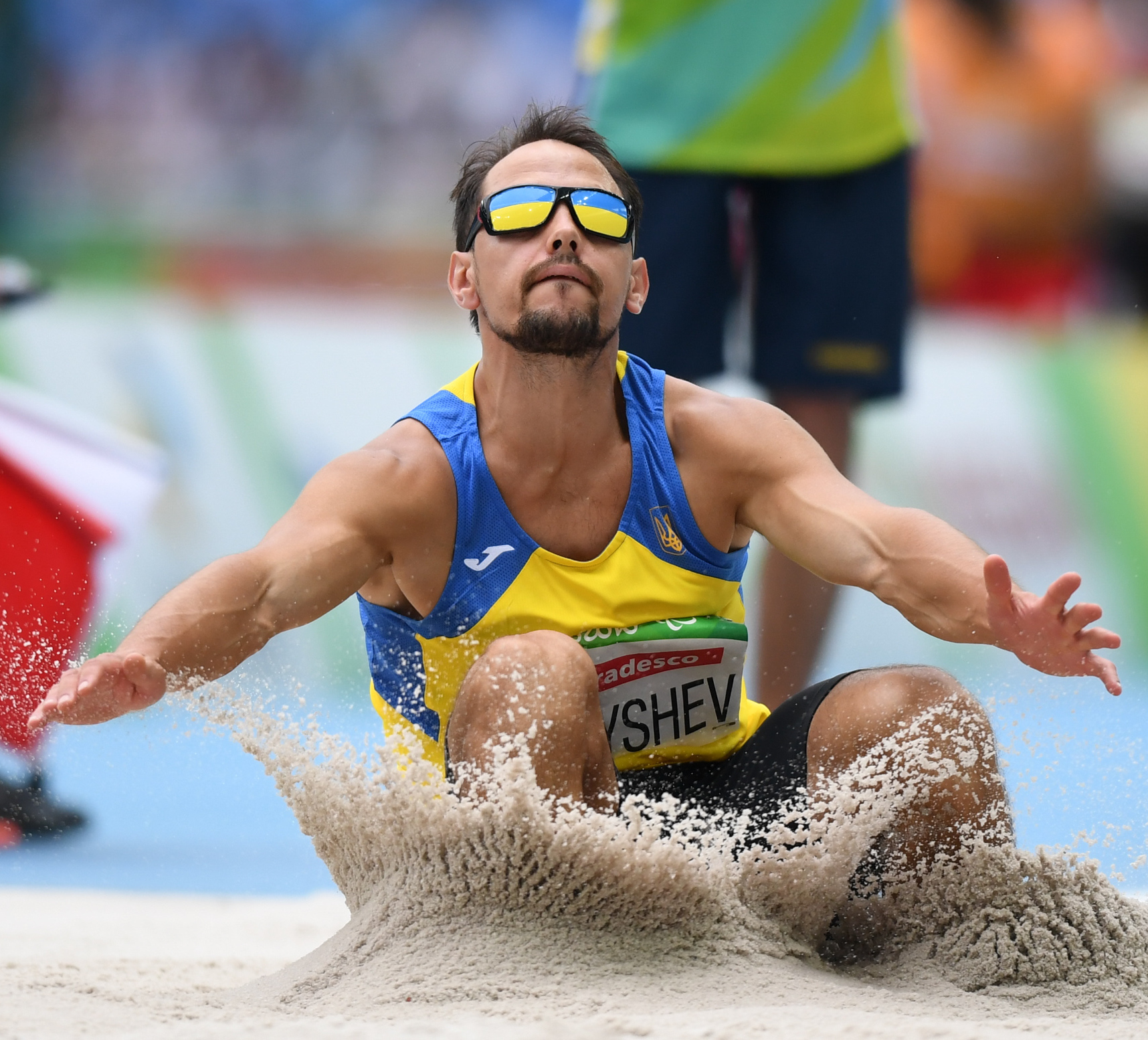 Rio de Janeiro - Primeiro dia das provas de atletismo nos Jogos Paralímpicos Rio 2016 (Tânia Rêgo/Agência Brasil)